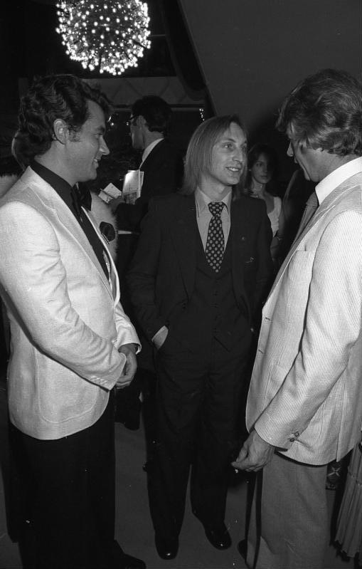 1.7.1977 Sommerfest im Bundeskanzleramt